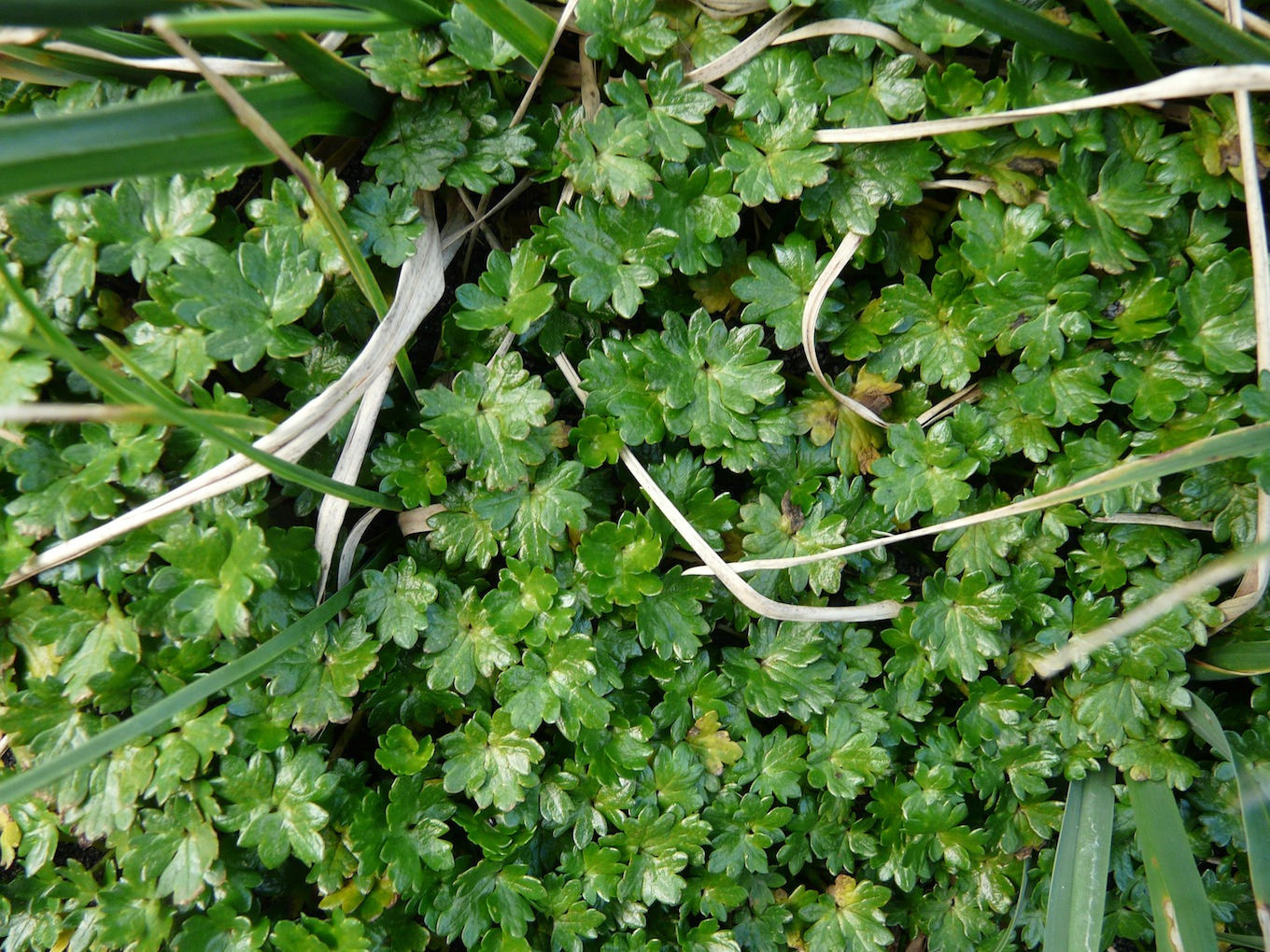 Ranunculus biternatus